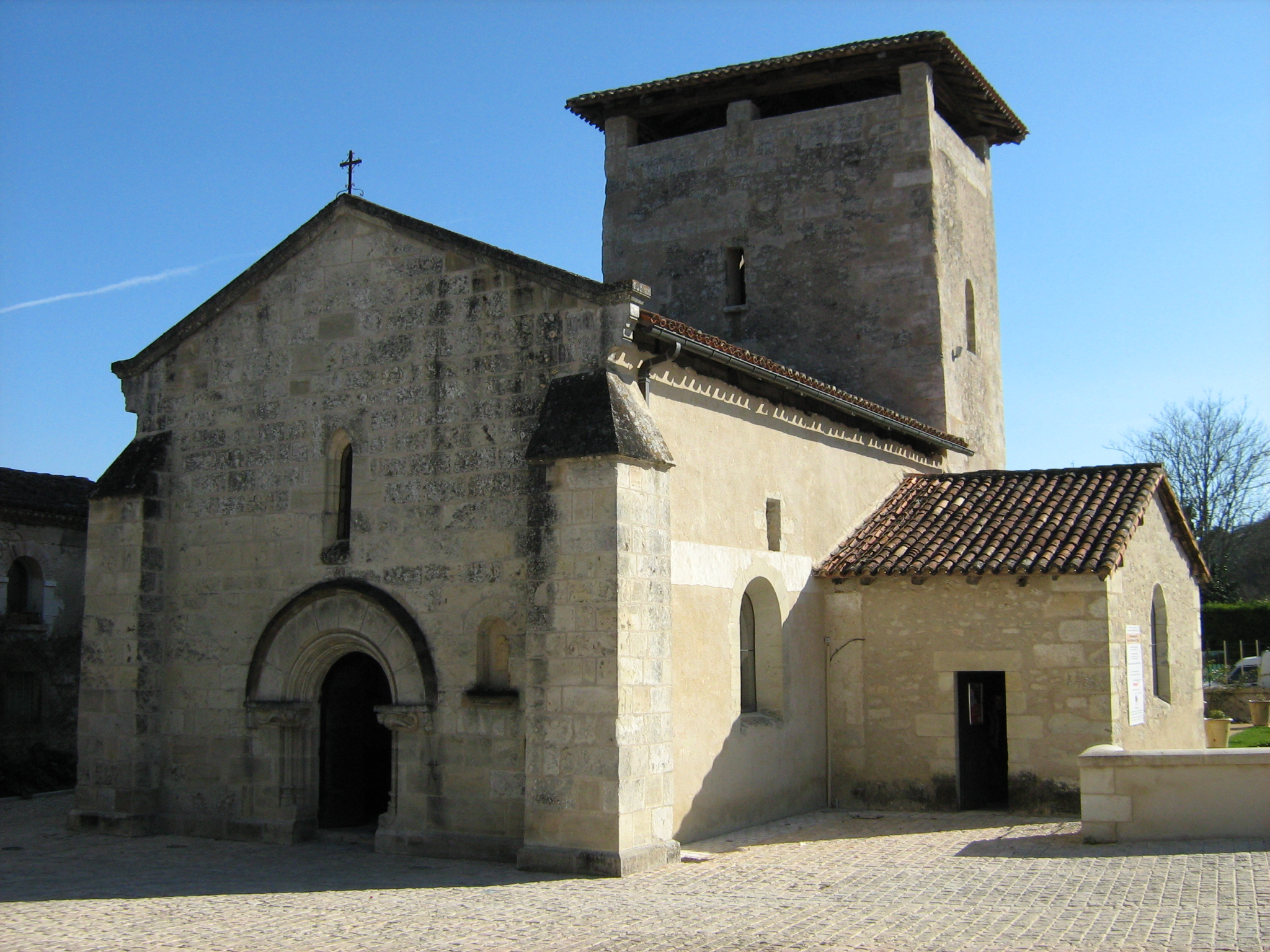 Église Saint-Saturnin, Marsac-sur-l'Isle, Dordogne, France.